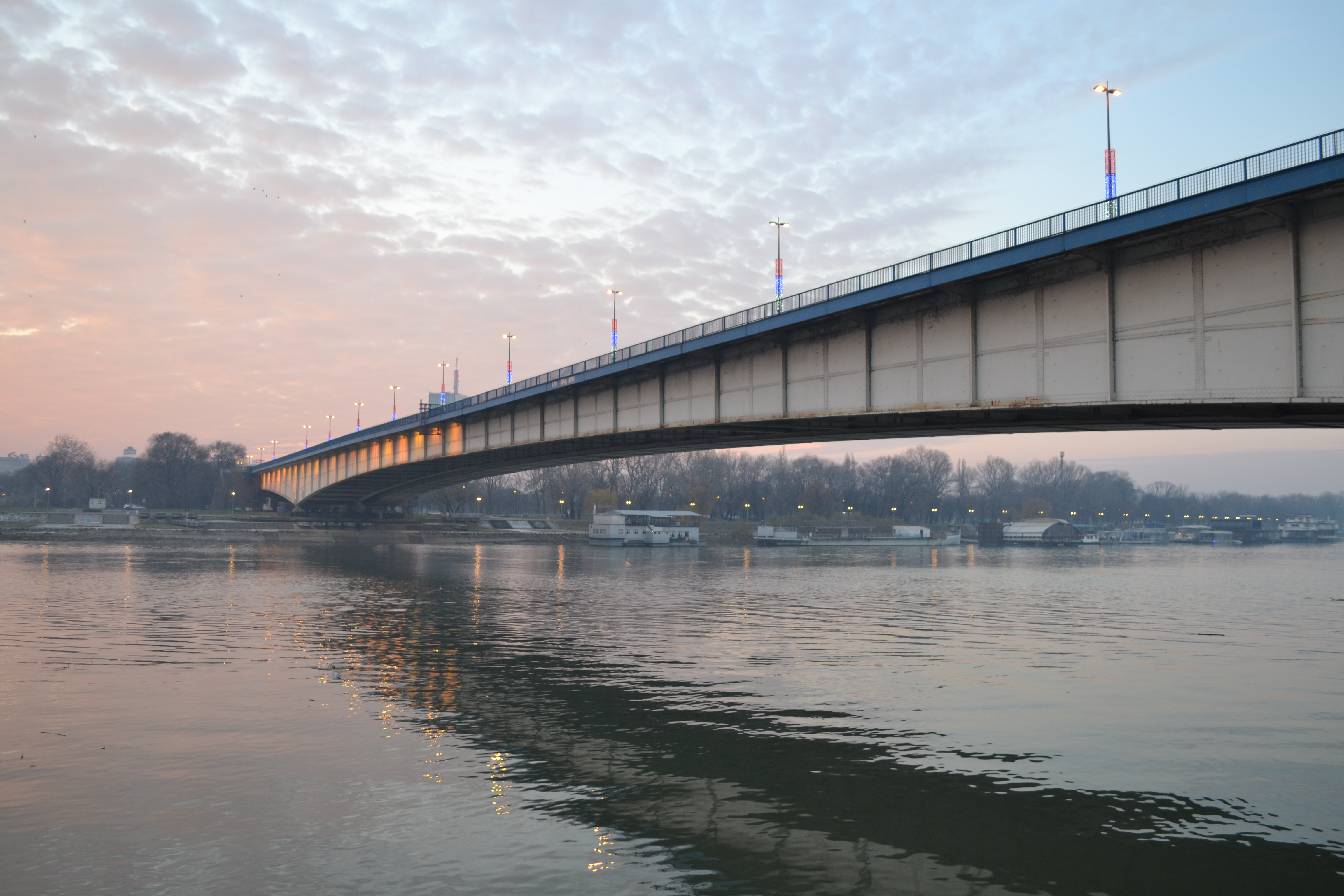 Sava er en elv i Sørøst-Europa, og en av de store sideelvene til Donau fra høyre. Den er 945 km lang med et nedslagsfelt på 95 719 km². Den renner gjennom fire land: Slovenia, Kroatia, Bosnia-Hercegovina (utgjør den nordlige grensen) og Serbia.